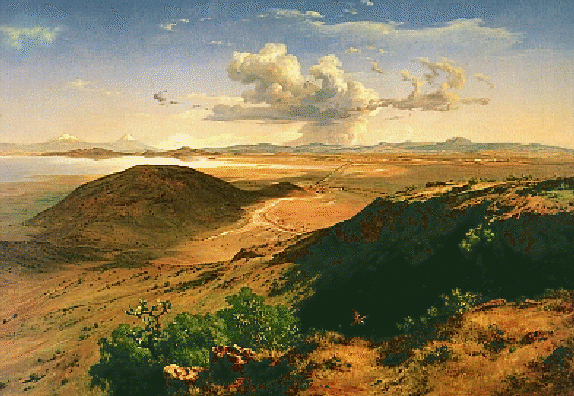 Valle de México, Óleo sobre tela. 160 × 229 cm., Museo Nacional de Arte, México.